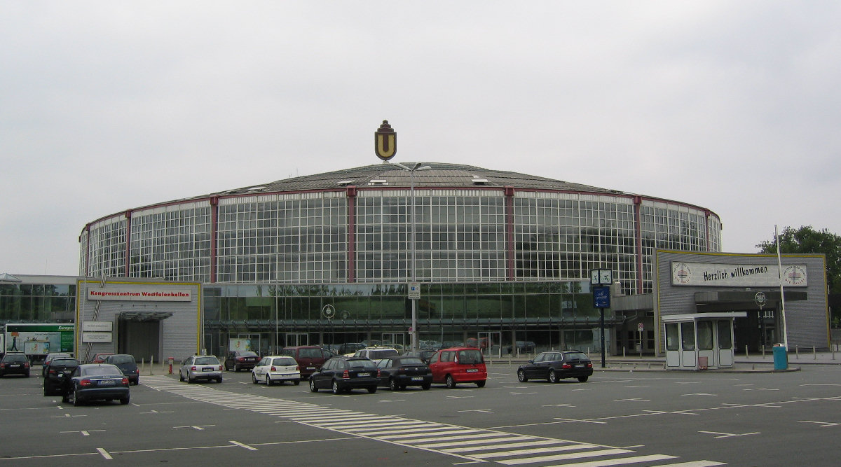 Westfalenhalle I Dortmund, südöstliche Ansicht